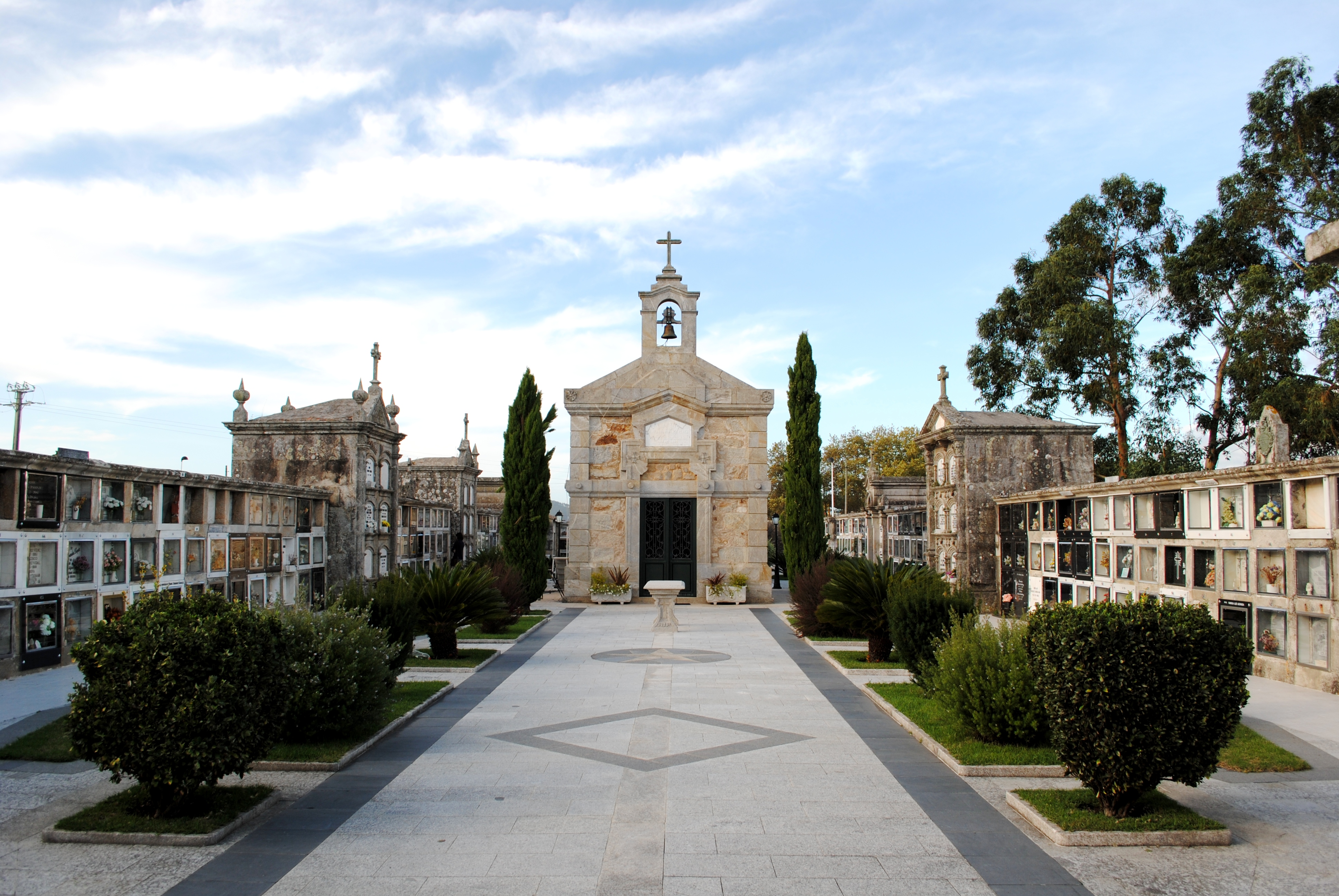 Cemiterio de Sabarís, Baiona